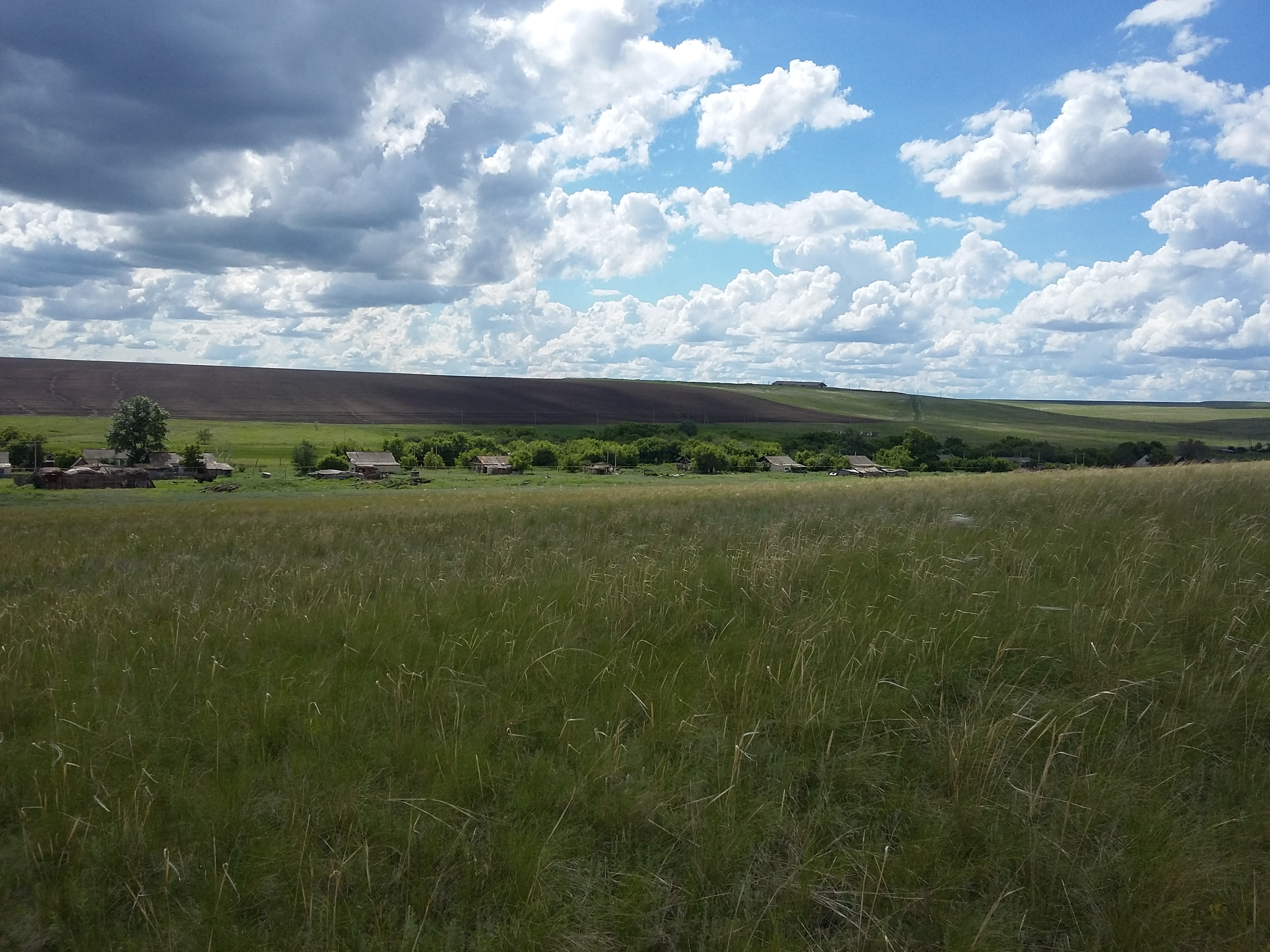 Вид на поселок Ручьевка